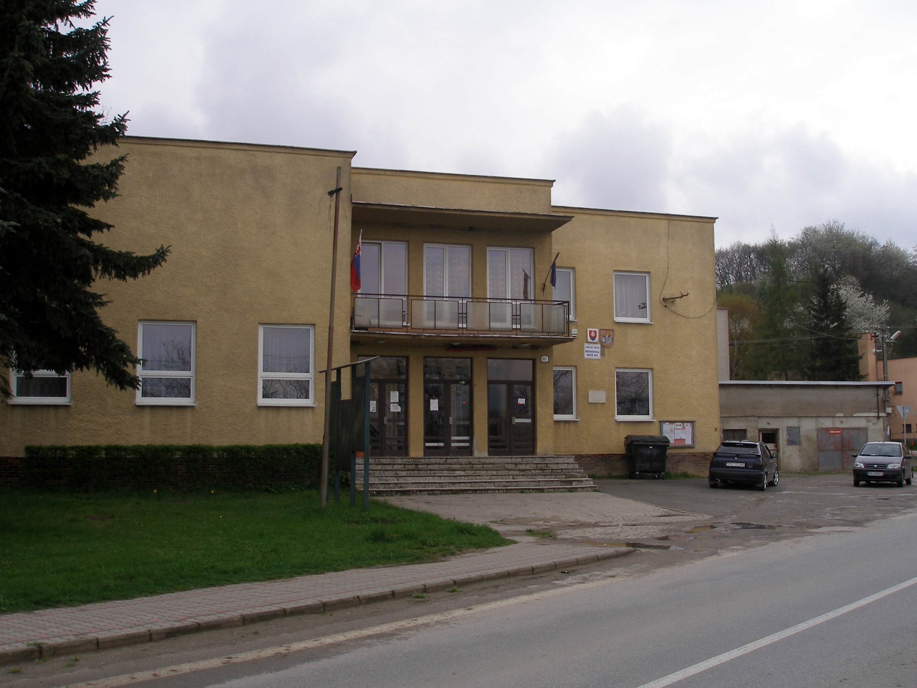 Obec Drienovská Nová Ves v okrese Prešov, región Šariš